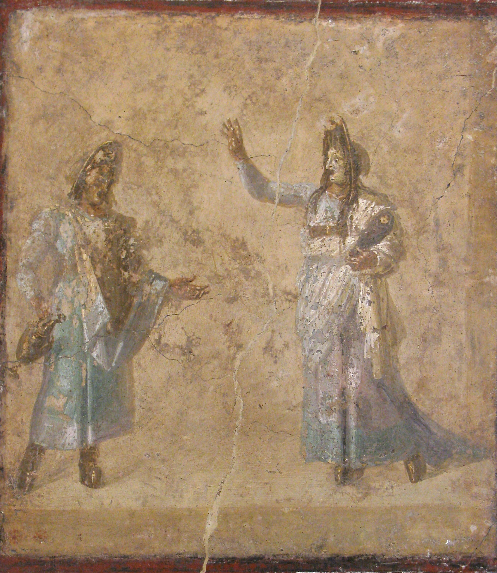 Museo Archeologico Nazionale di Napoli (inv. nr. 9039). Da Pompei, Casa dei Dioscuri - Scena di tragedia.